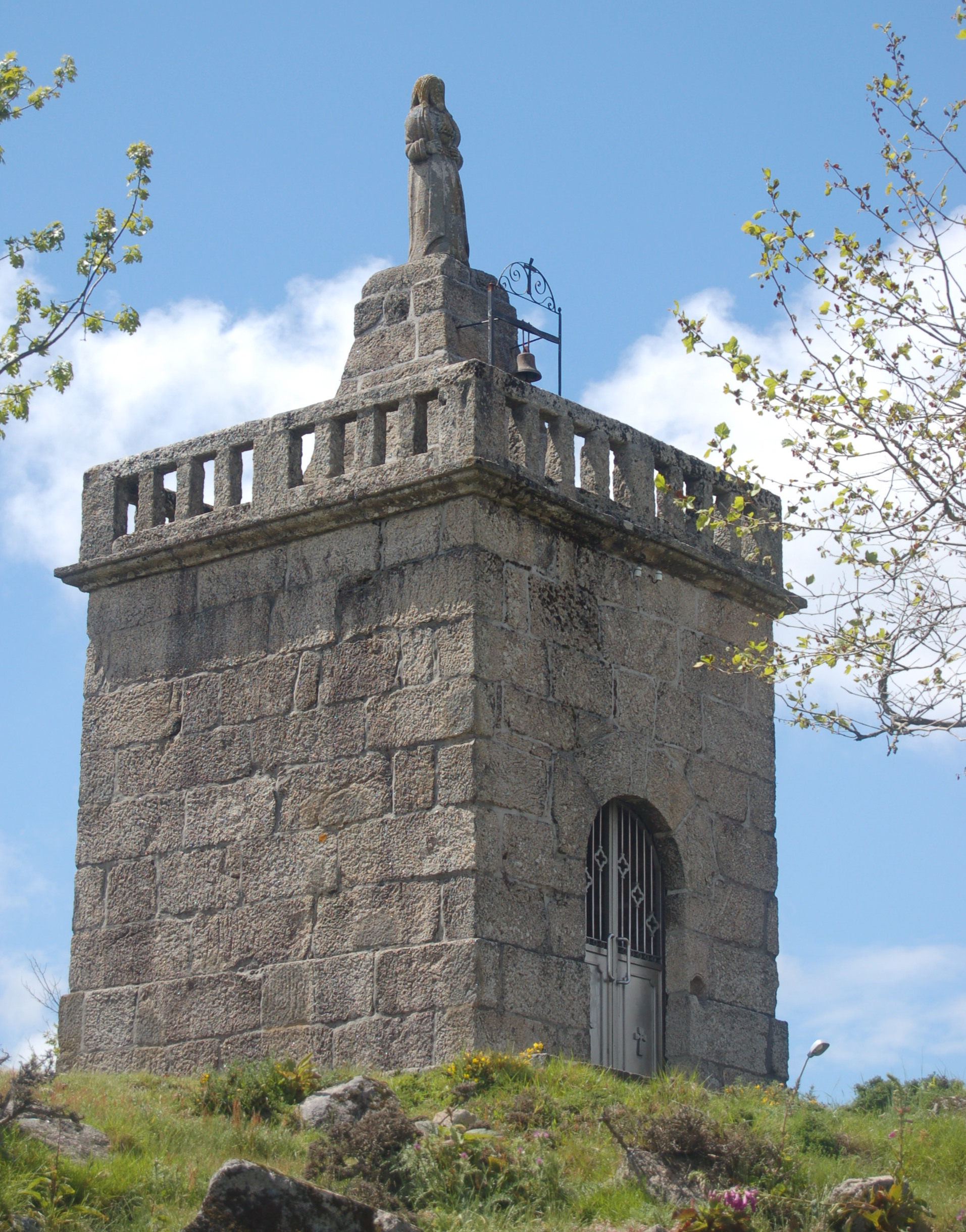 Santuario de Cristo Rei en Xustáns (Ponte Caldelas)